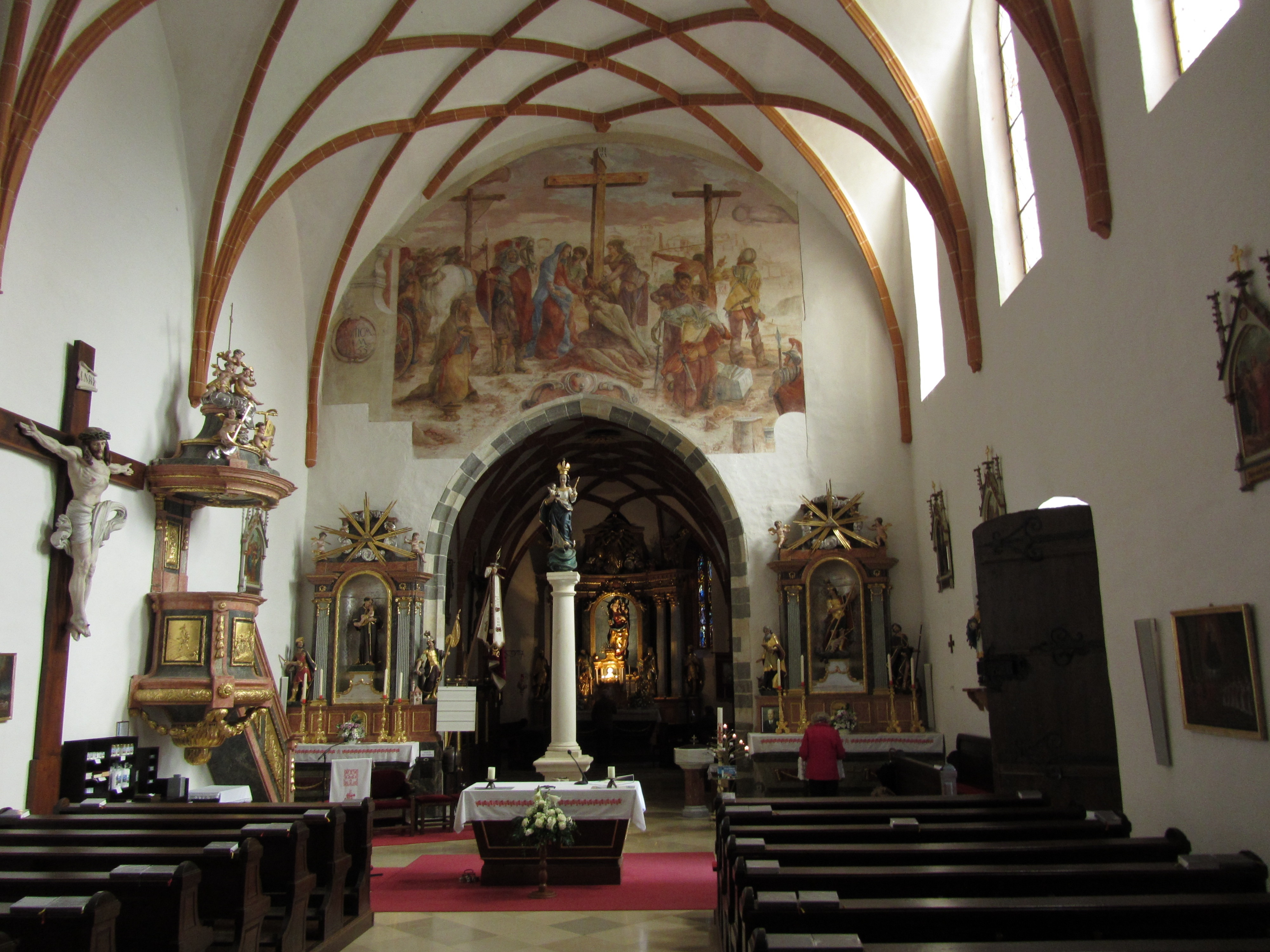 Hauptschiff gegen Hauptaltar